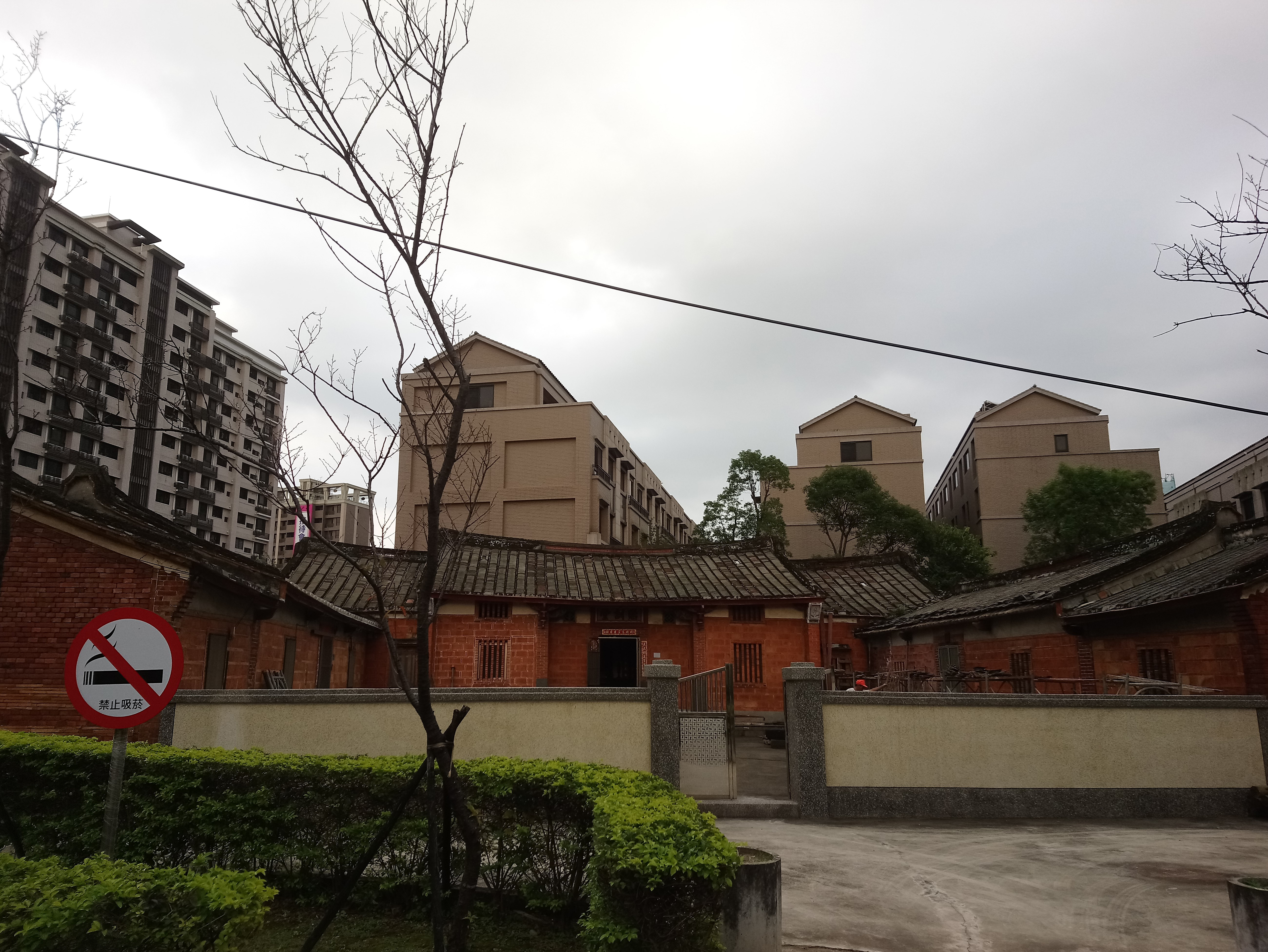 八德呂達川祠堂,桃園市八德區福興里